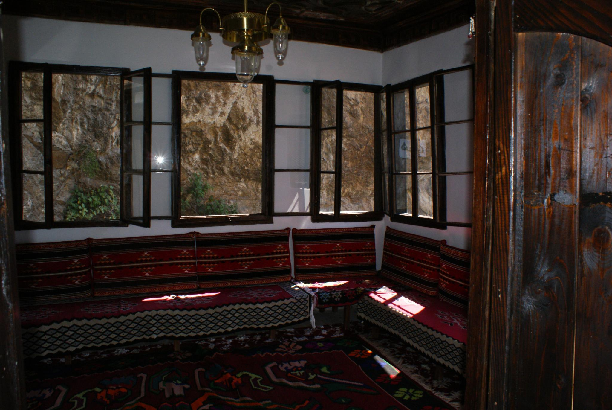 Buna 07